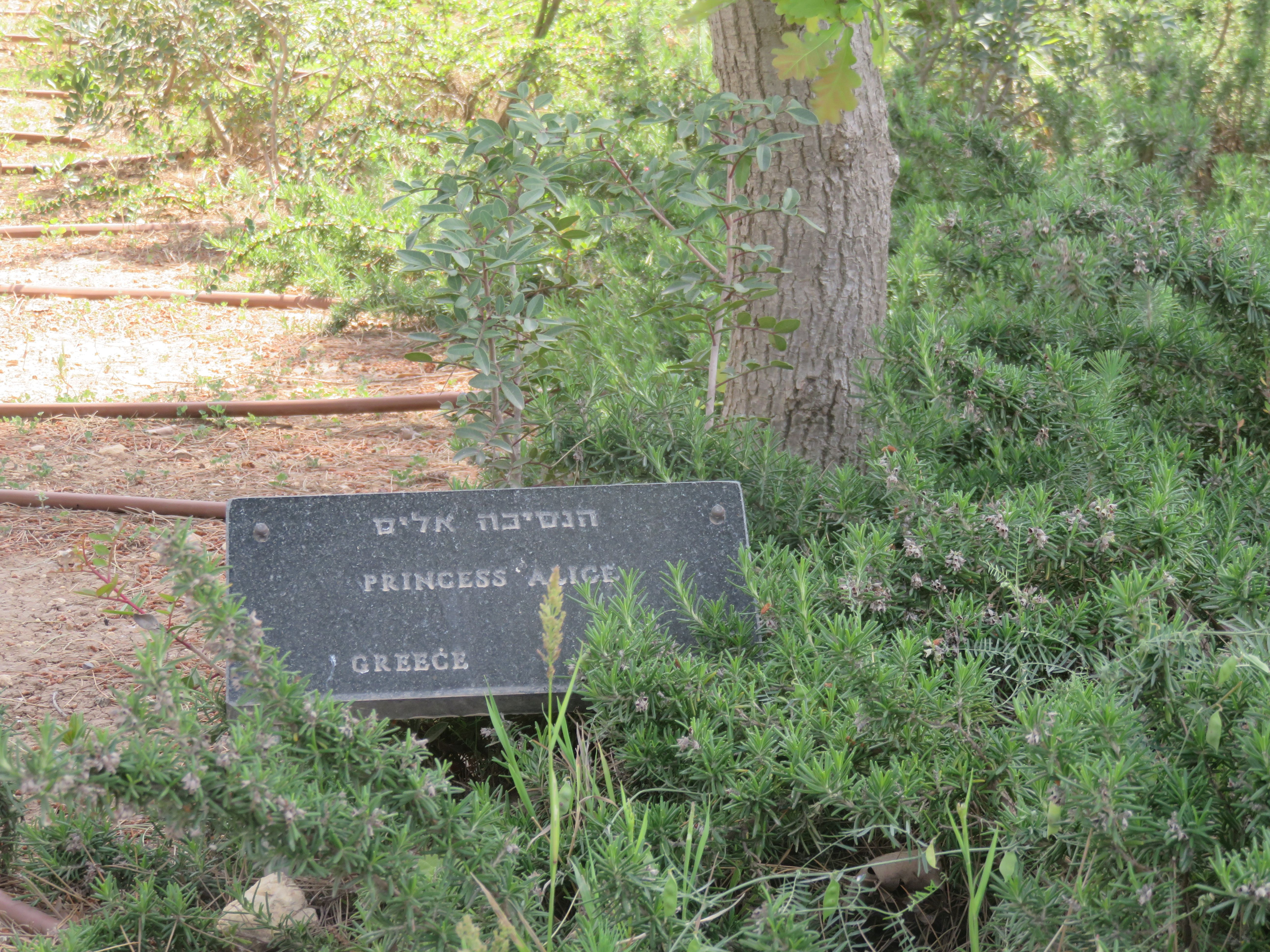 השלט לרגלי העץ של הנסיכה אליס בחלקת חסידי אומות העולם ביד ושם